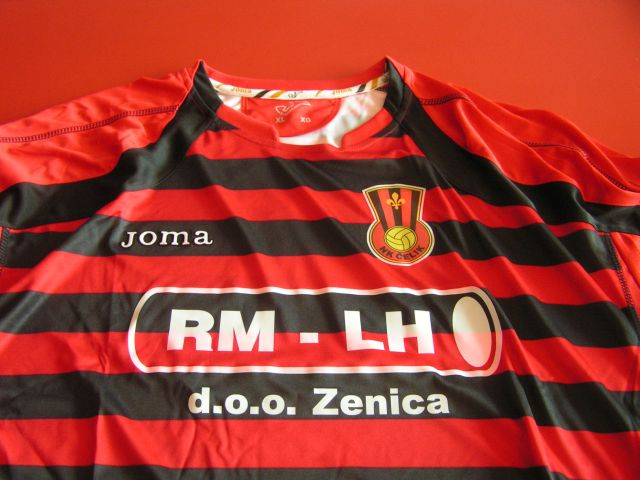 Dres i grb NK Celik Zenica u sezoni 2010/11